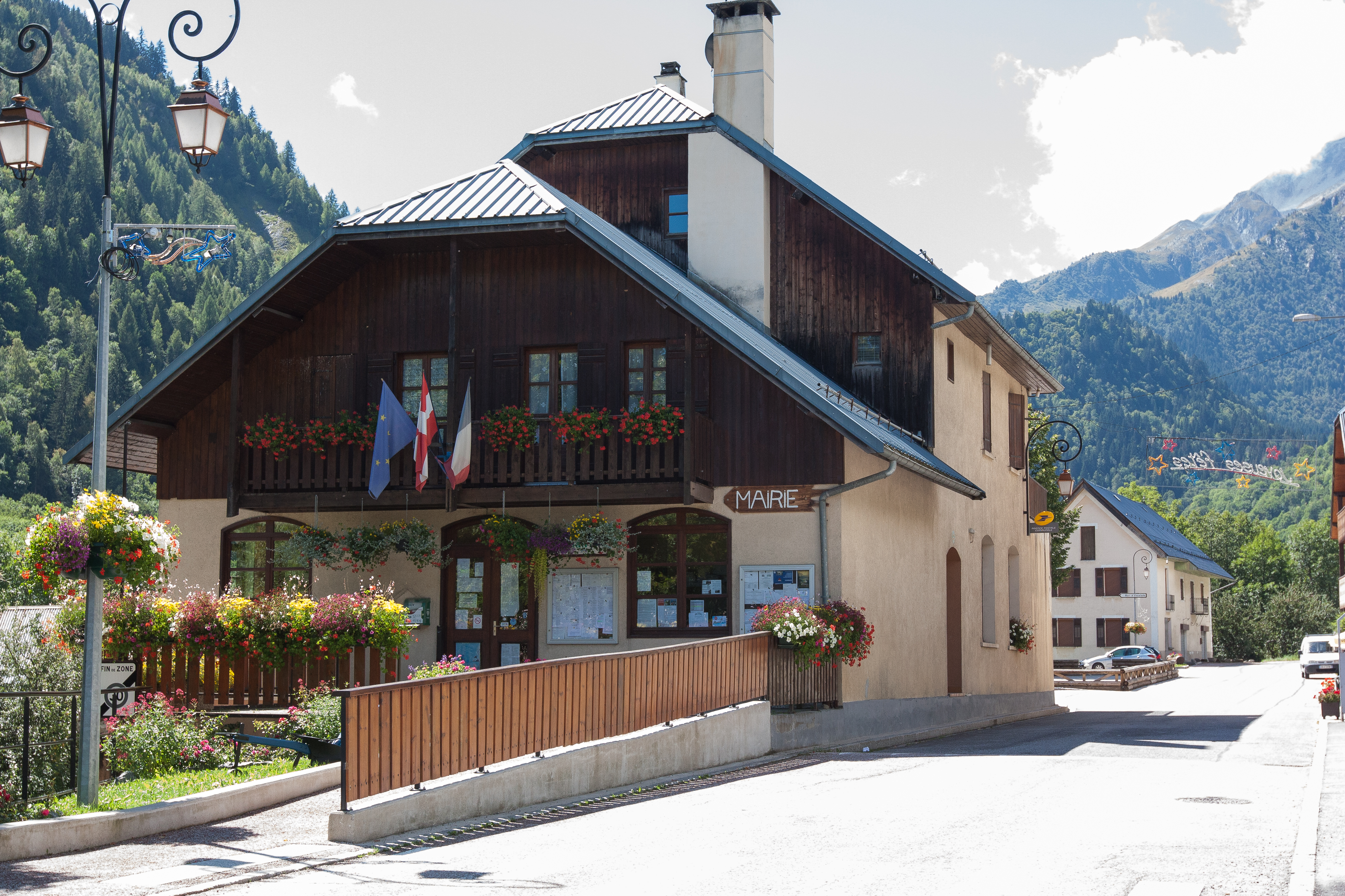 Mairie de Saint-Colomban-des-Villards / Saint-Colomban-des-Villards / Savoie / France